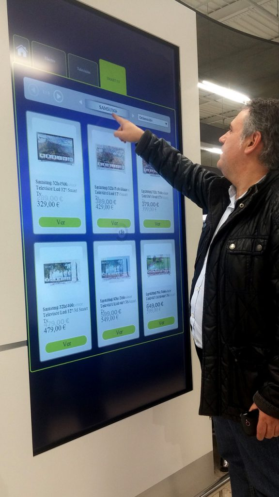 software de digital signage DENEVA